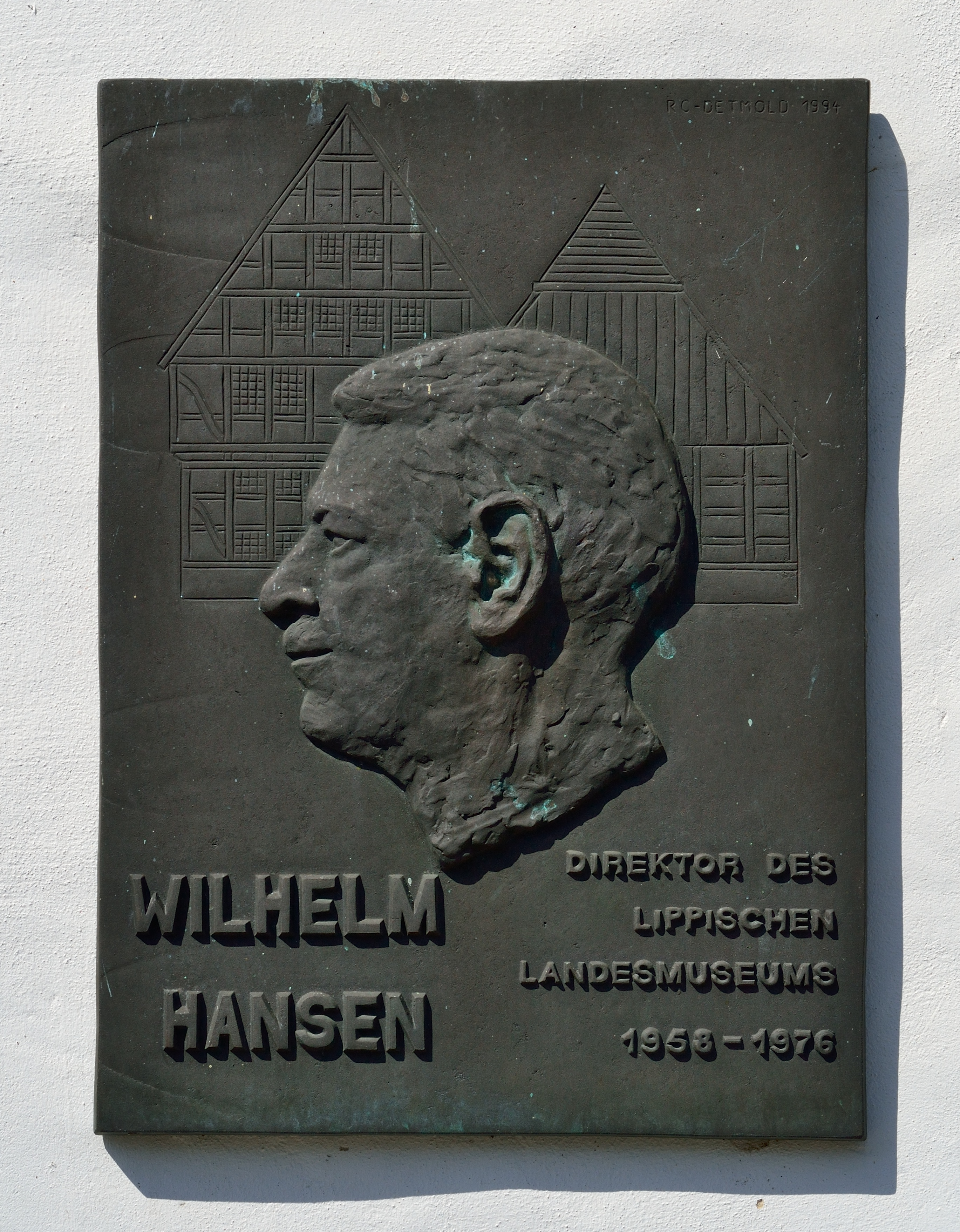 Gedenktafel für den ehemaligen Museumsdirekt Wilhelm Hansen am Kornhaus des Lippischen Landesmuseums in Detmold